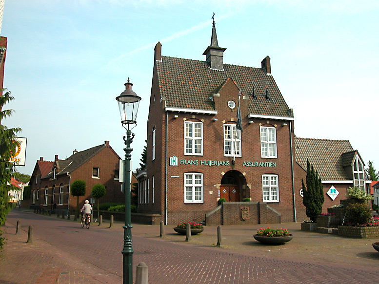 Zentrum of St. Odilienberg